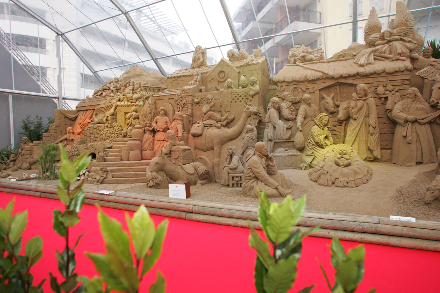 Presepe di Sabbia, Jesolo 2005. licenza GFDL